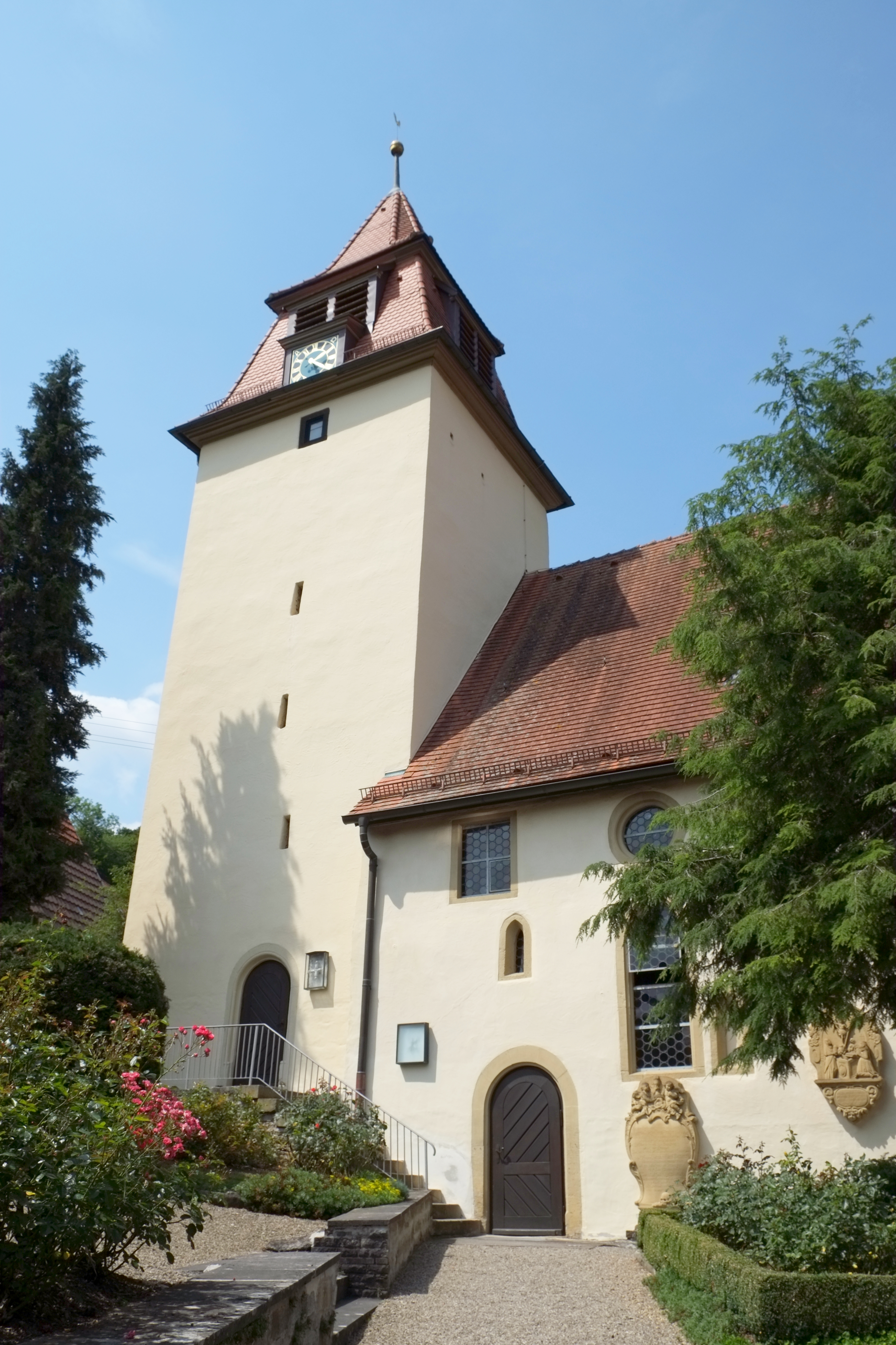 Evangelische Kirche in Crispenhofen, einem Ortsteil von Weißbach (Hohenlohe) im Hohenlohekreis (Baden-Württemberg, Deutschland)